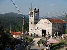 Amarante Olo